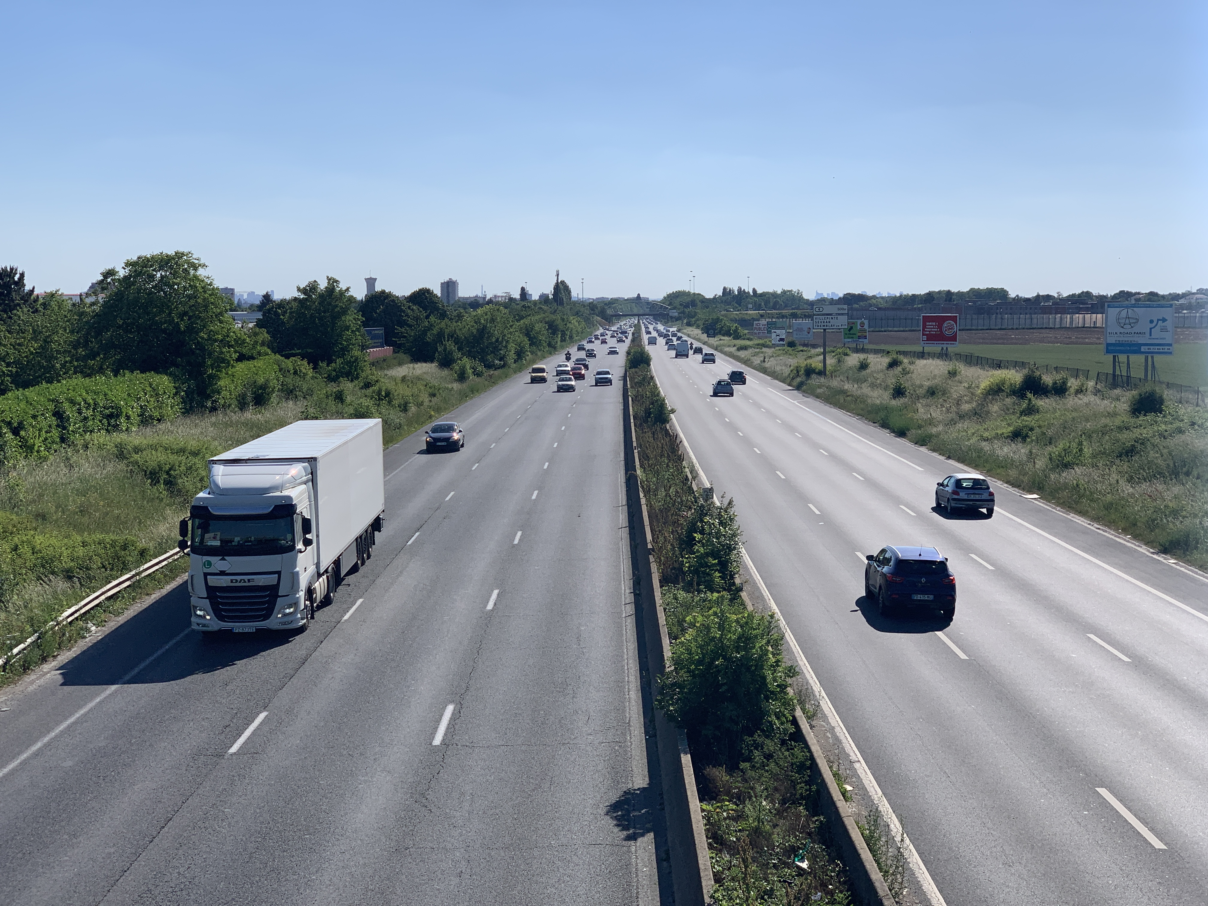 L'autoroute A104 vue depuis le pont de l'avenue du Général Pouderoux, Tremblay-en-France.